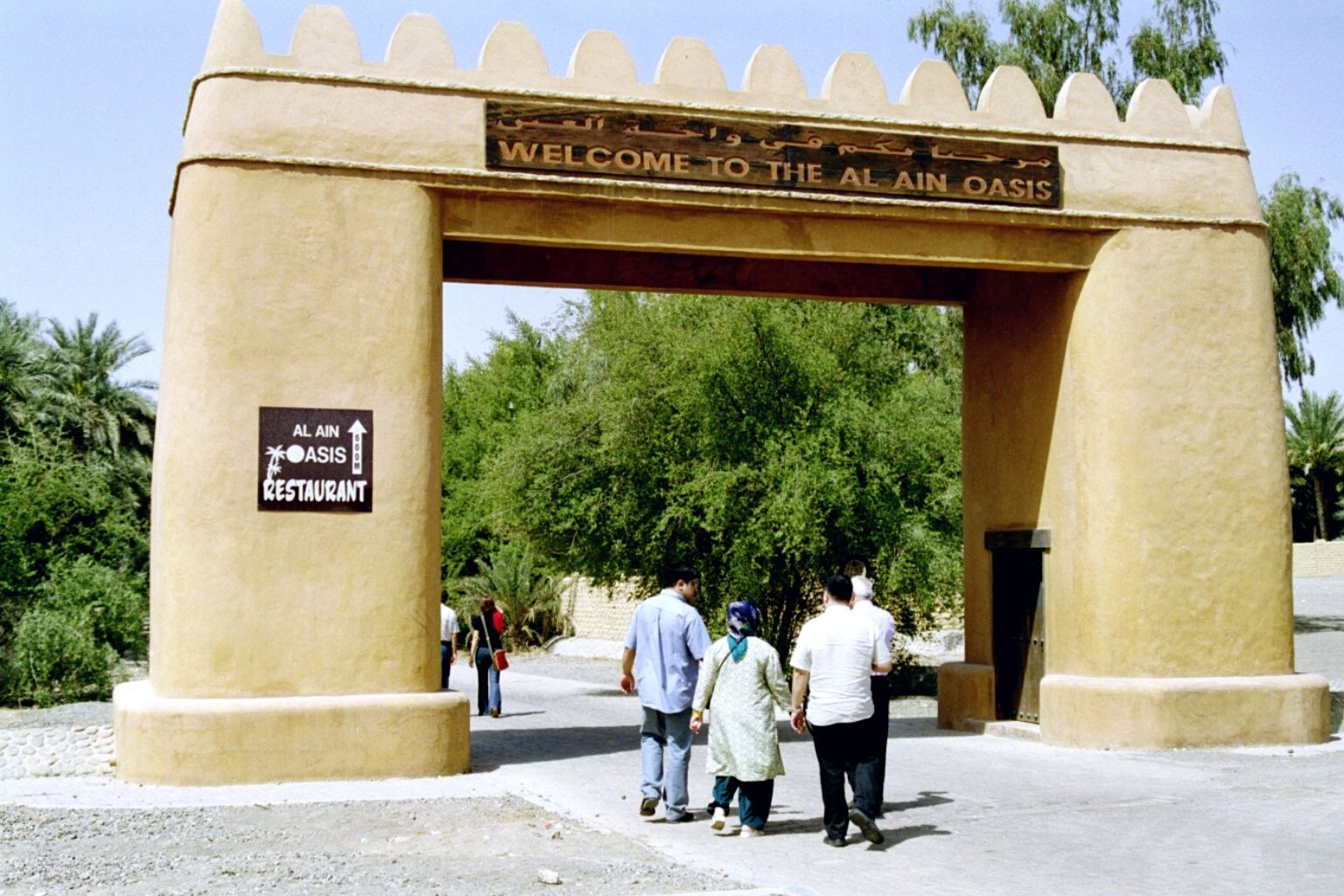 Eingang zur Oase Al-Ain